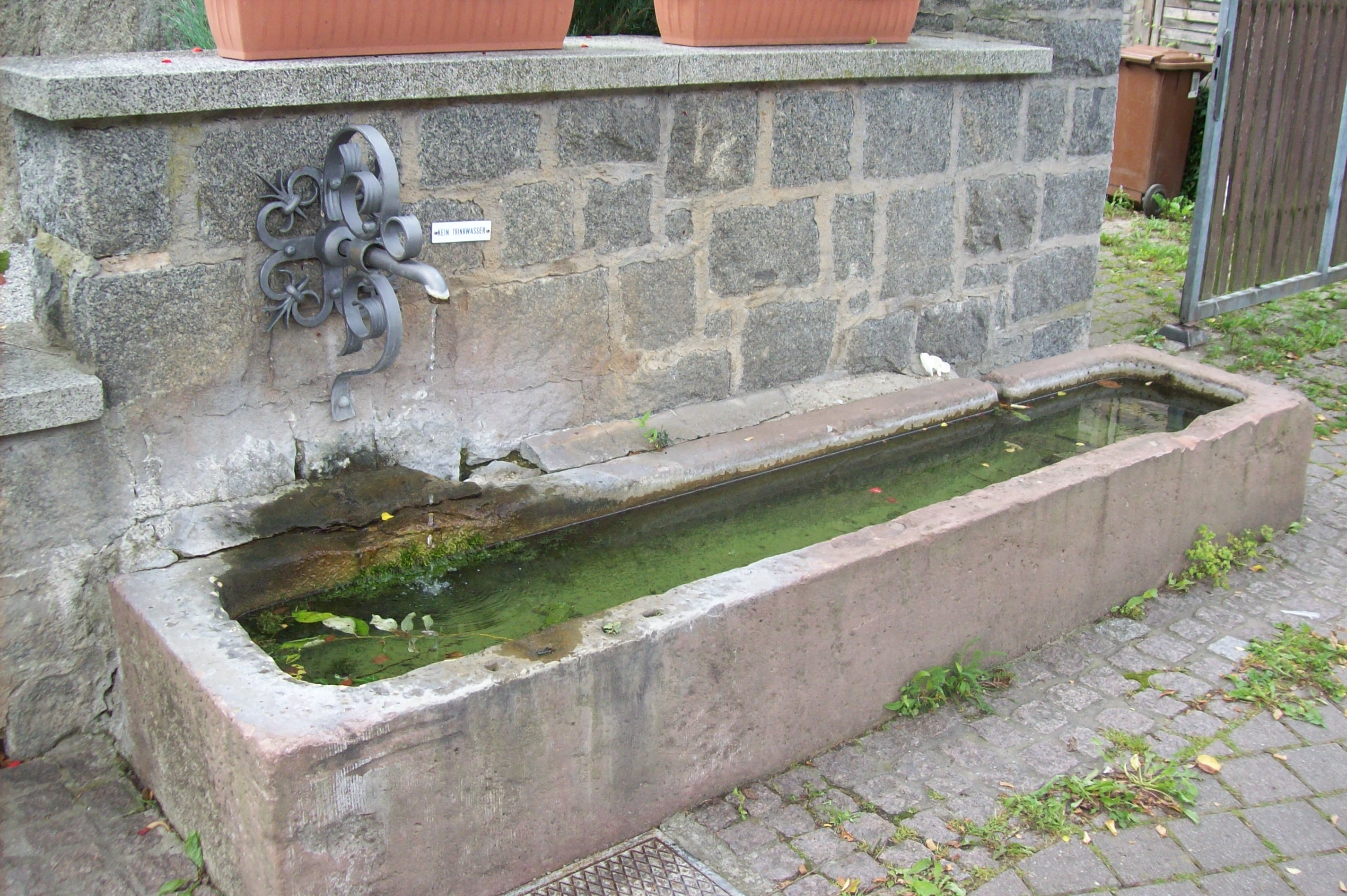 Alter Brunnen in der Ortsmitte von Bensheim-Hochstädten, Hessen, Deutschland